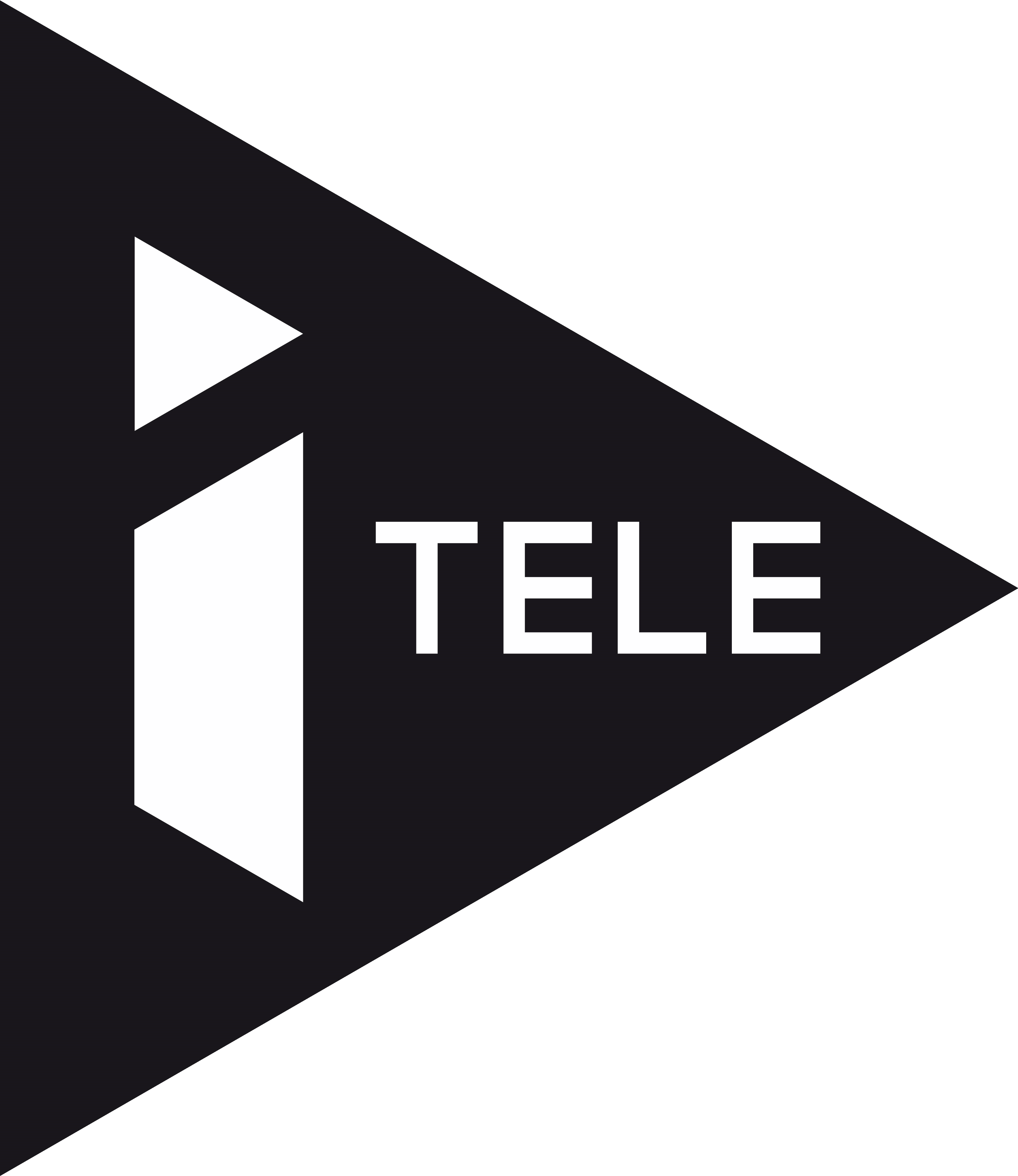 Logo de la chaîne iTELE à l'antenne depuis le 26 Août 2013